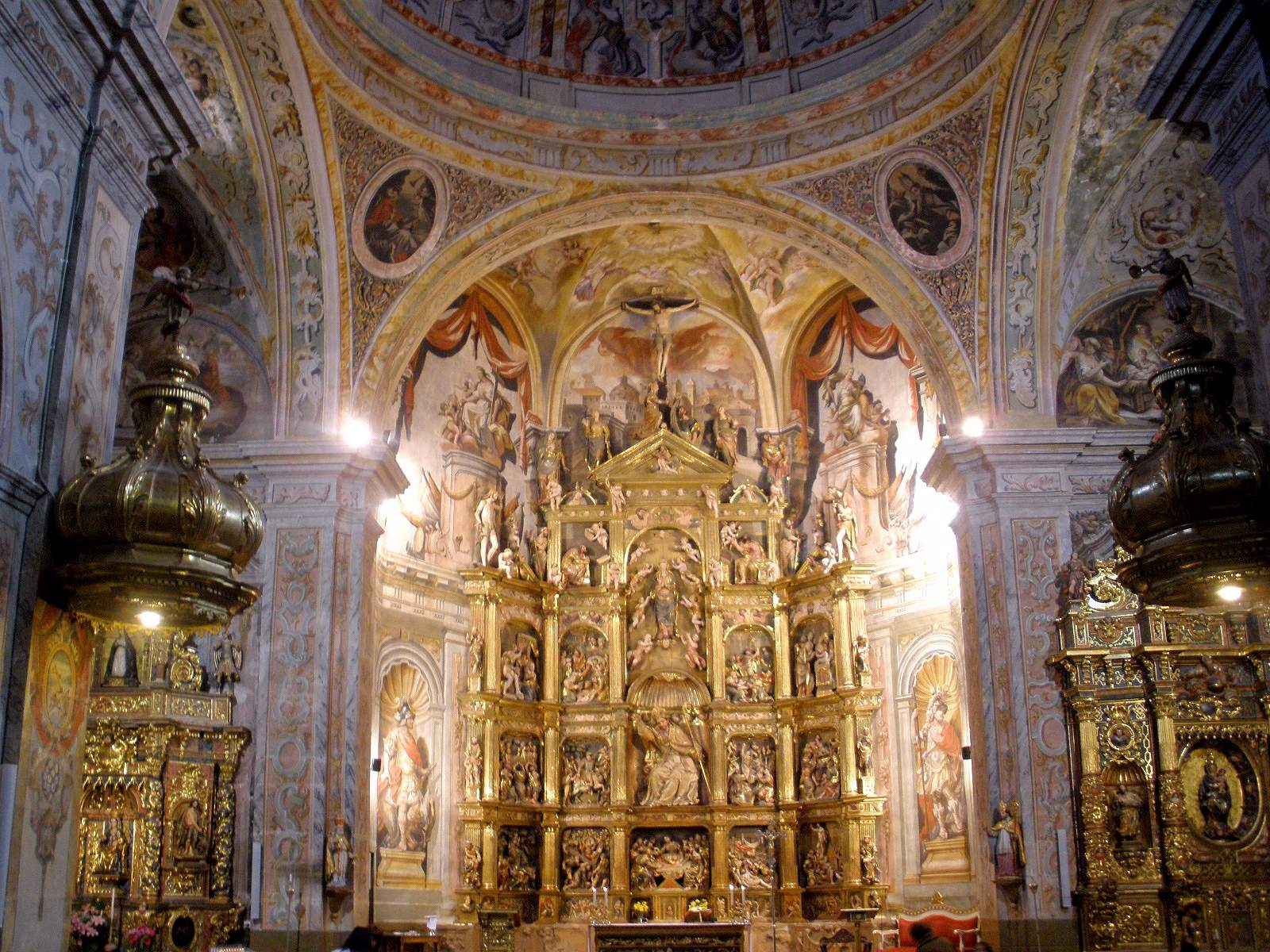 Church of San Martín, Alberite